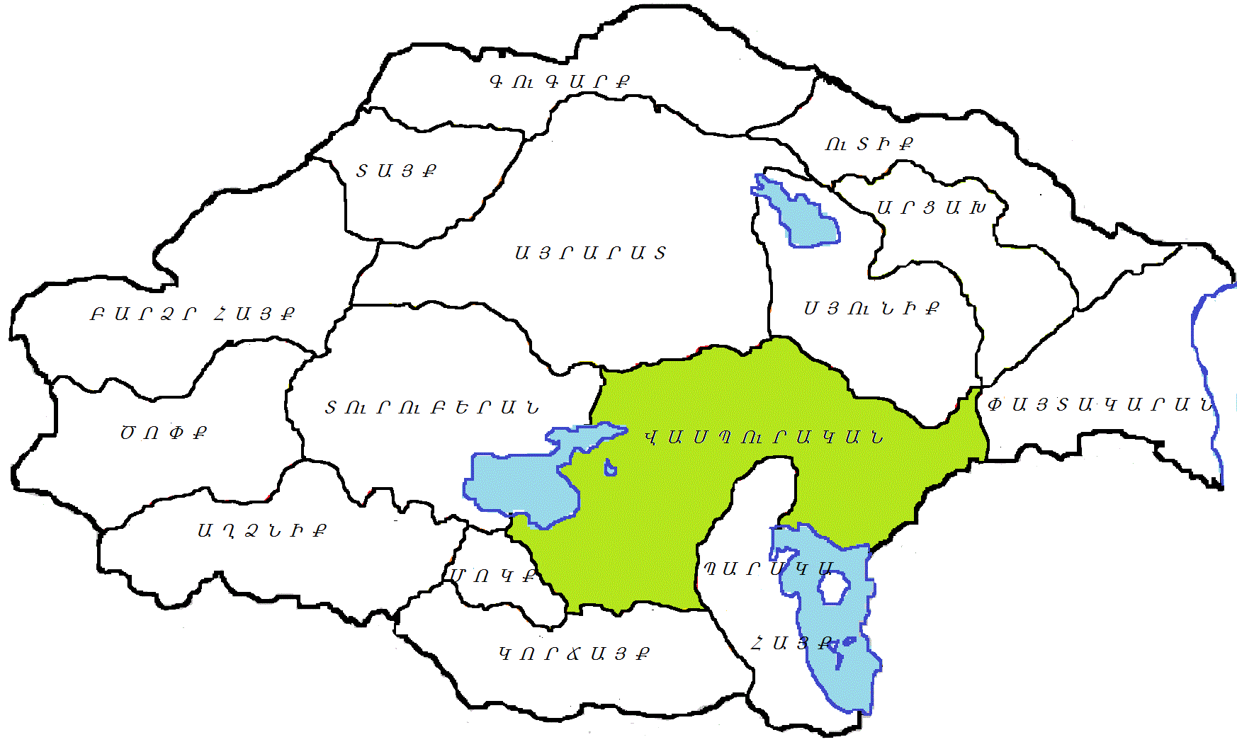 Վասպուրական, Մեծ Հայք